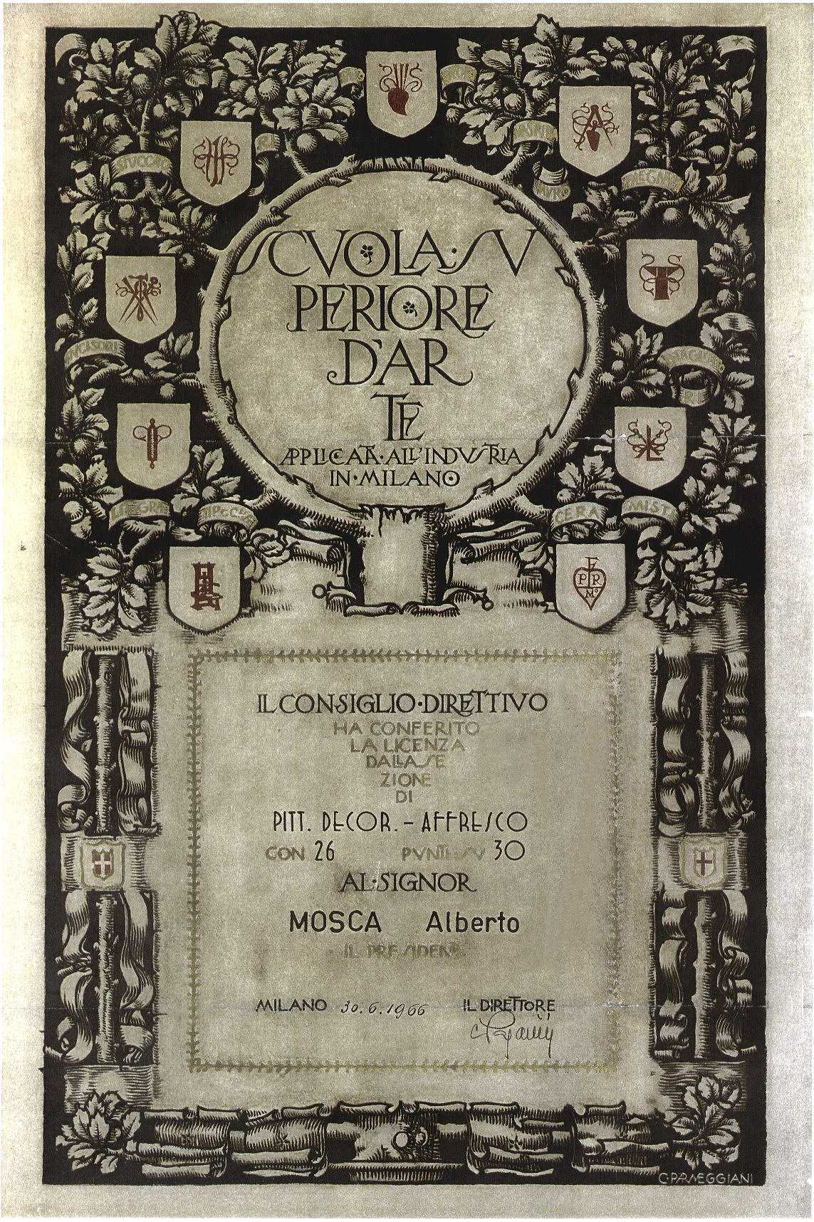 Scuola Superiore d'Arte applicata all'Industria diploma di Pittura Decorazione-Affresco rilasciato al signor Alberto Mosca il 30.6.1966